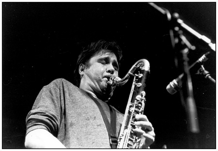 Photo de Louis Sclavis prise à Villeurbanne le 24/03/2001 à l'occasion d'un concert de soutien à 7 sans-papiers grévistes de la faim.